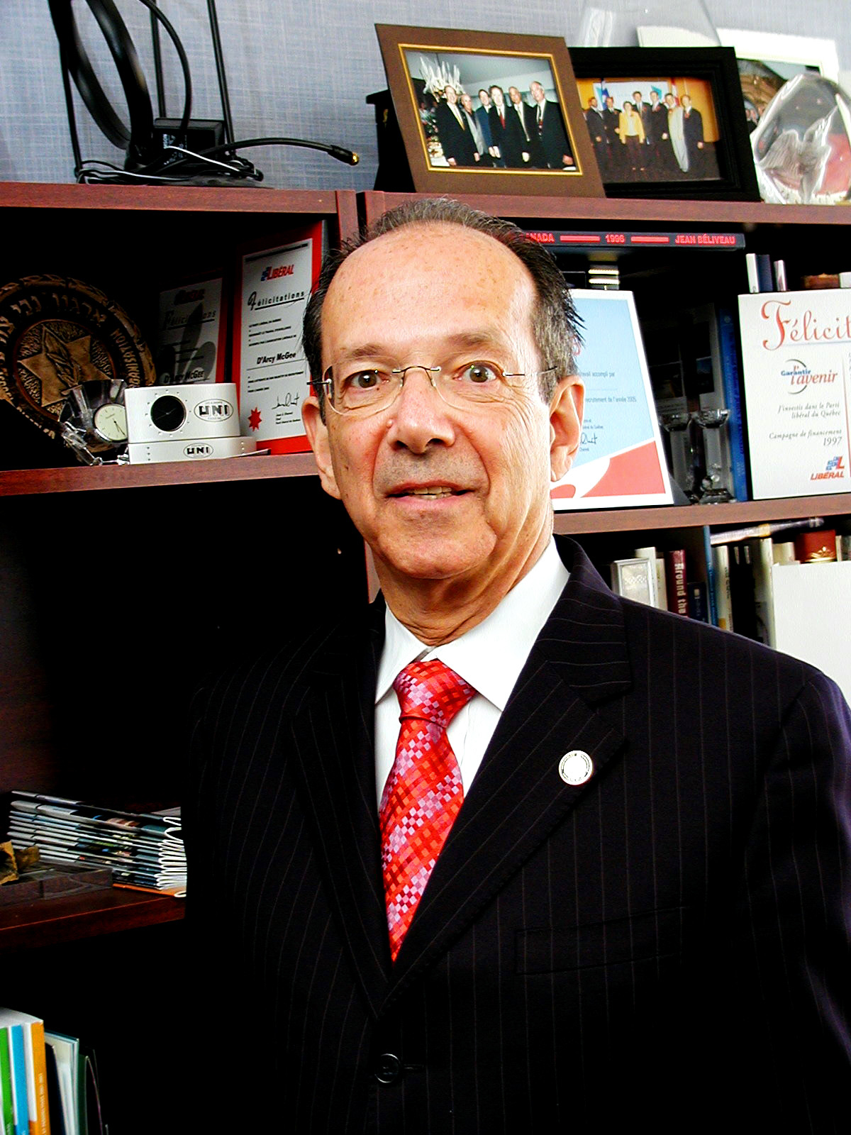 D'Arcy McGee Liberal MNA Lawrence Bergman. Lawrence S. Bergman (né 6 décembre 1940 à Montréal) est un homme politique québécois et ministre du gouvernement Charest de 2003 à 2007.